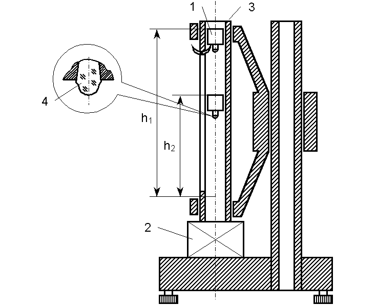 Схематическое изображение склероскопа Шора, установленного на штативе.